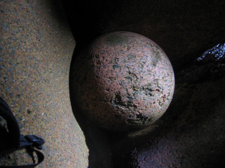 Rocher granitique curieux en forme de boule sur la presqu'île Renote à Trégastel.